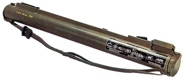 M-80 Zolja 64 mm.